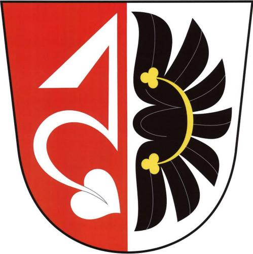 znak, Zahrádka, okres Třebíč